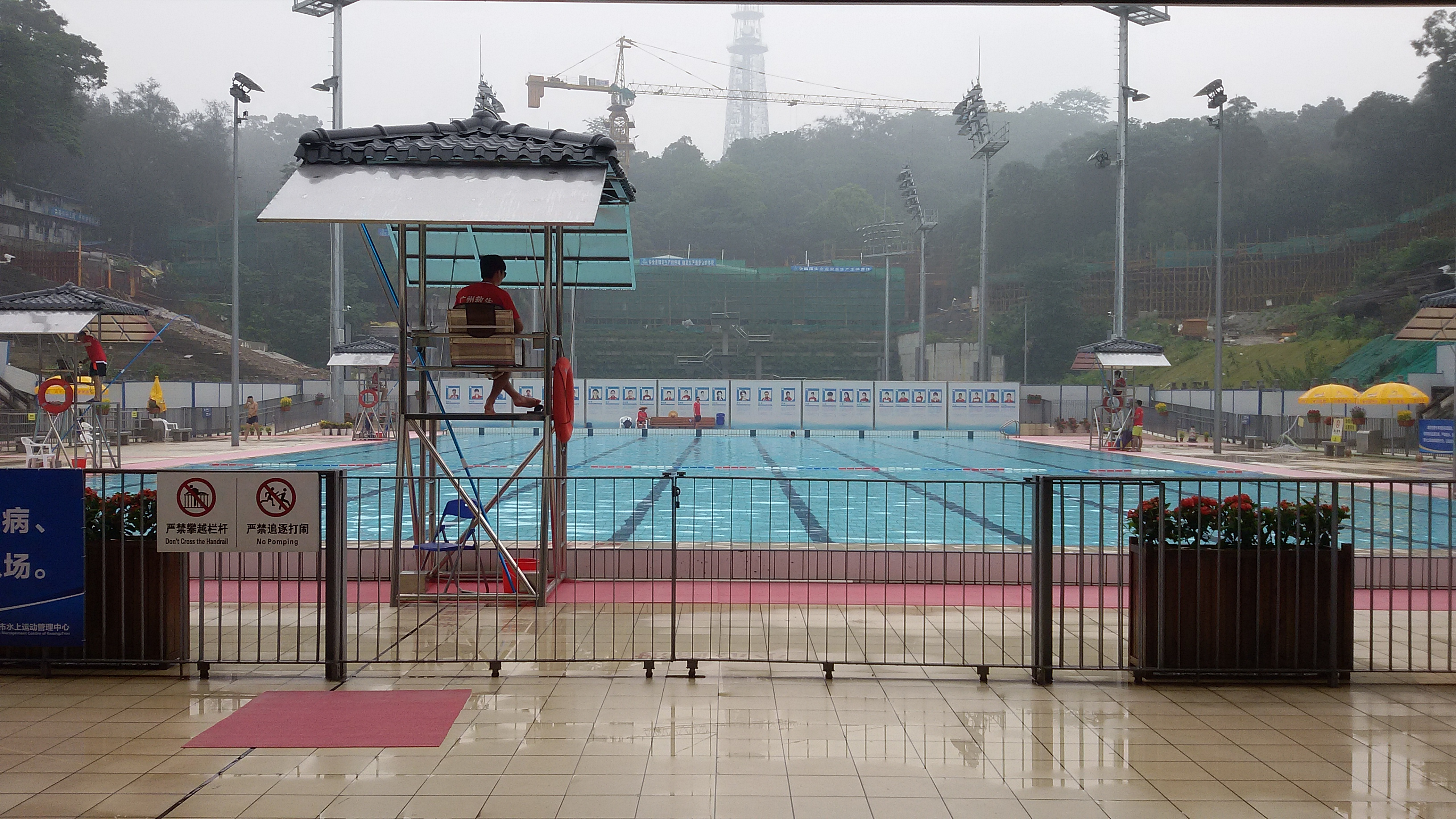 粵語: 越秀山泳场（2017年6月19号）